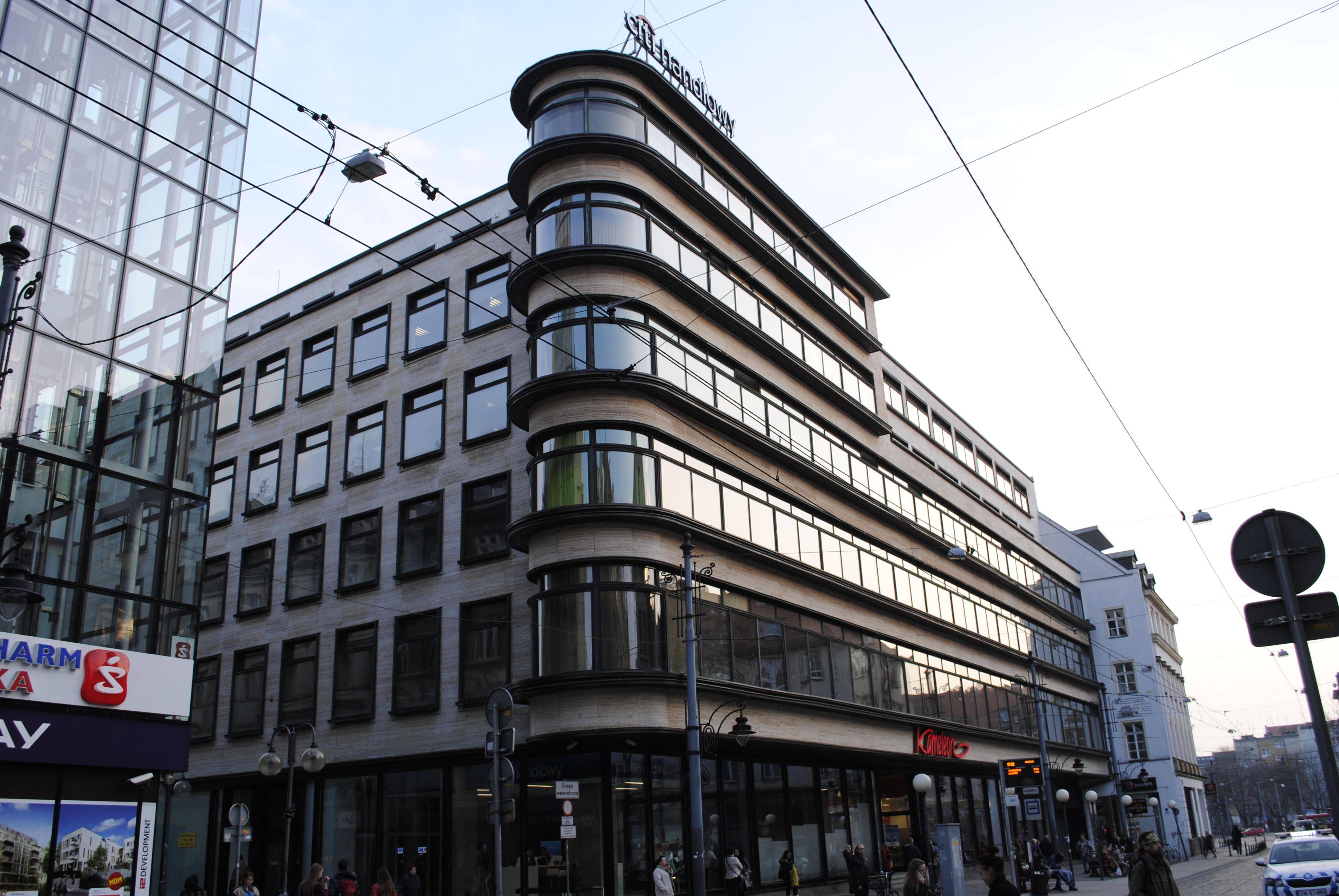 Kaufhaus Rudolf Petersdorff